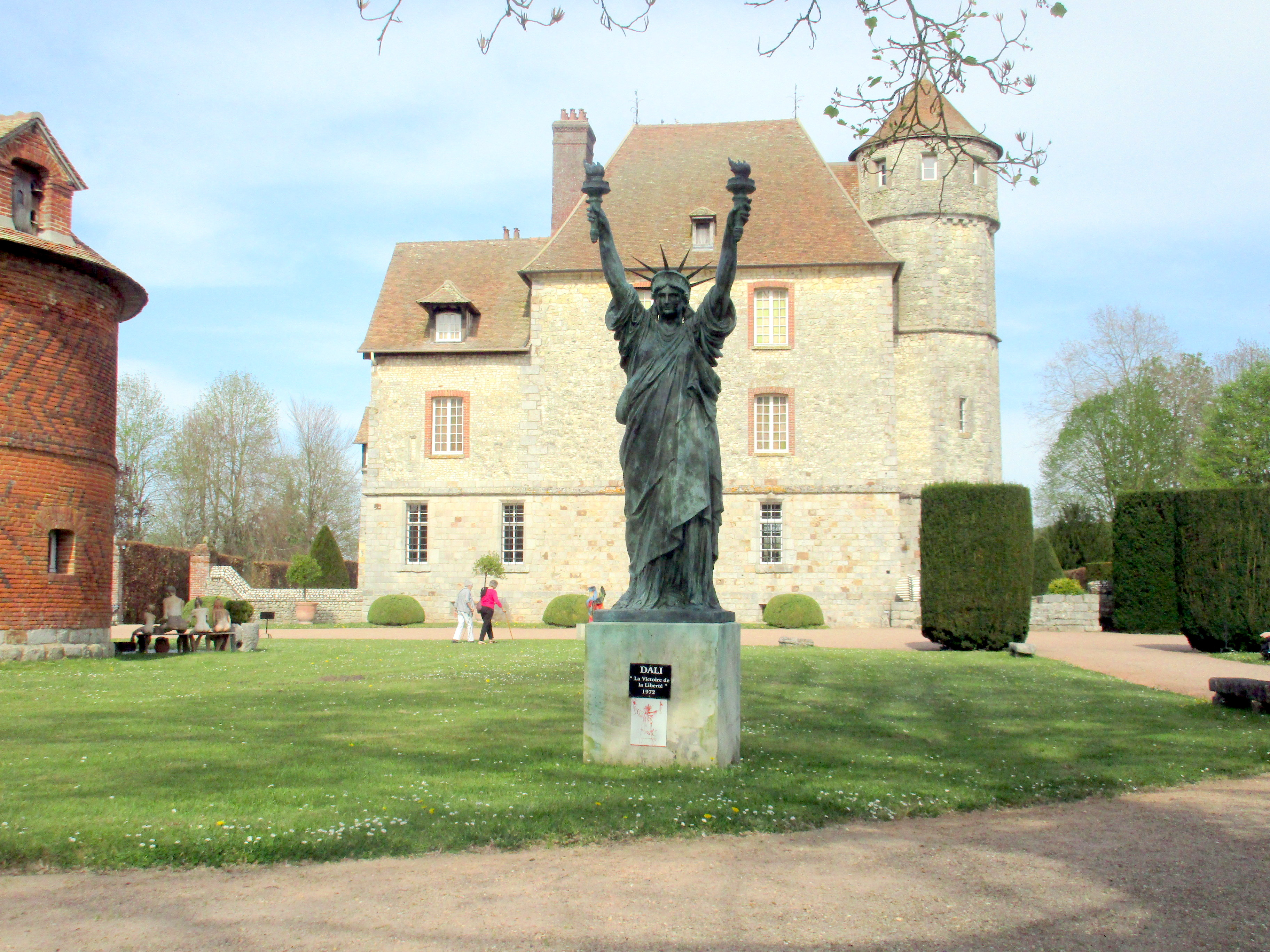 Vascœuil - Pâques 2019 - Victoire de la Liberté - Salvador Dali